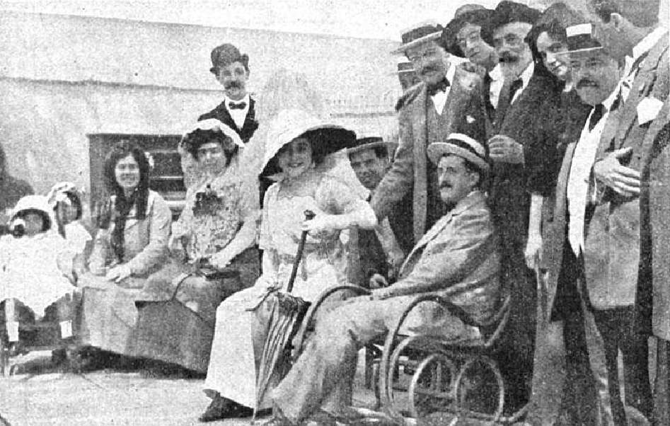 Cupletista Paquita Escribano junto a los hermanos Álvarez Quintero. Rodeados de periodistas en la caseta de la Asociación de la Prensa, en la Feria de Sevilla en 1912.